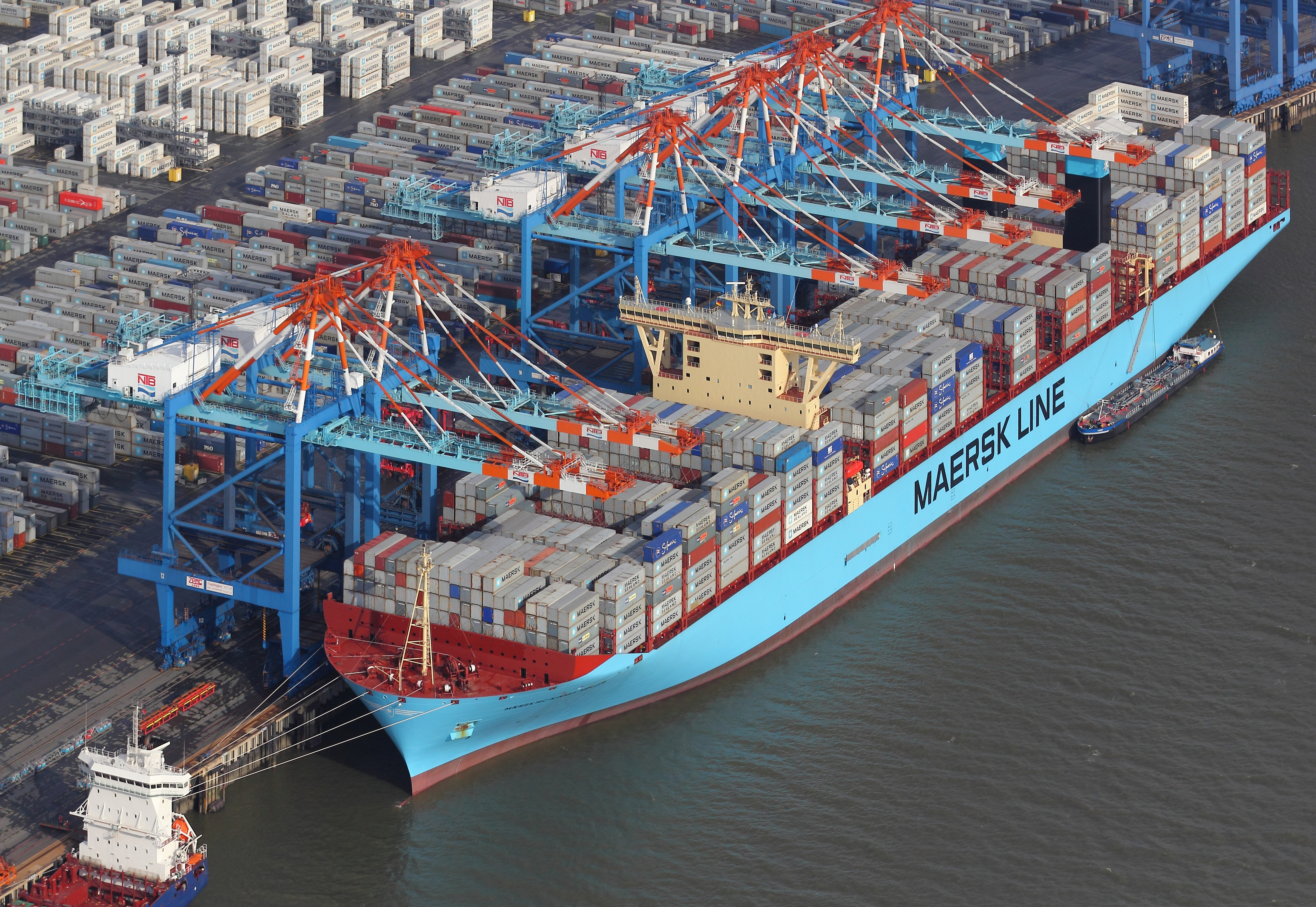 „Maersk Mc Kinney Möller" maiden call Bremerhaven 2013-08-18